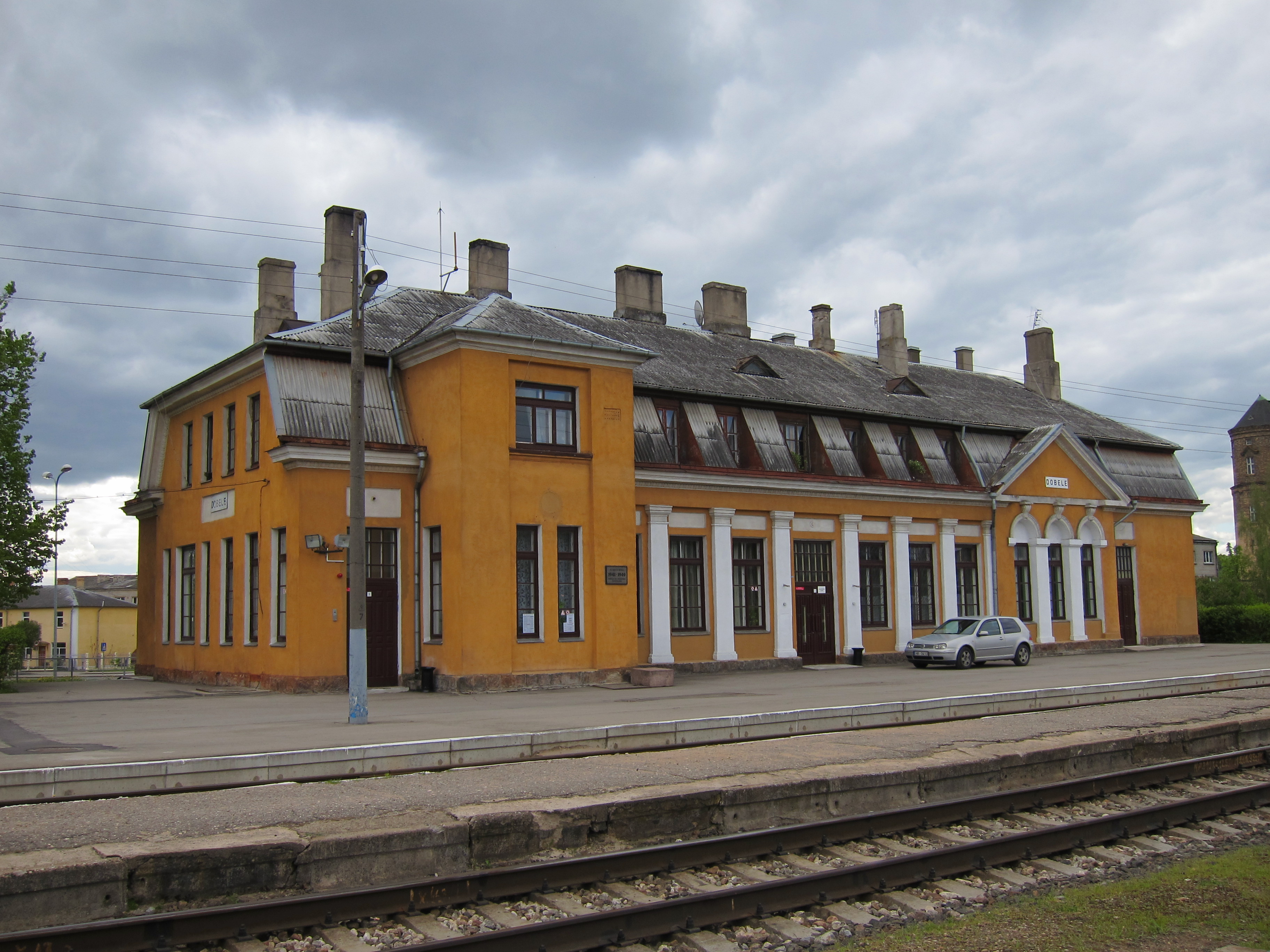 Dobeles stacijas ēka